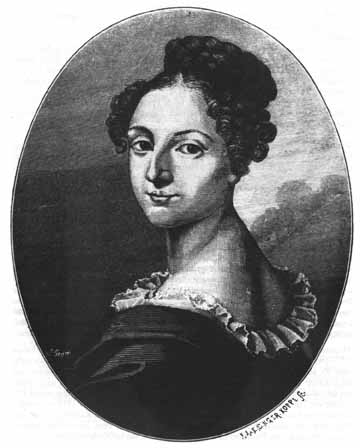 Maria Amalia Prinzessin von Sachsen (aka Amalie Heiter) (1794–1870) Lithographie